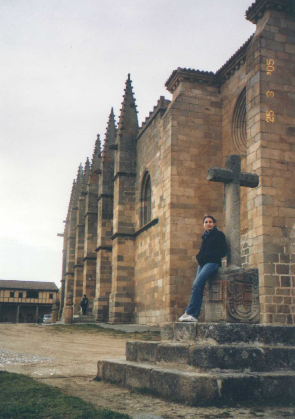 IGLESIA DE BONILLA DE LA SIERRA (ÁVILA; ESPAÑA)